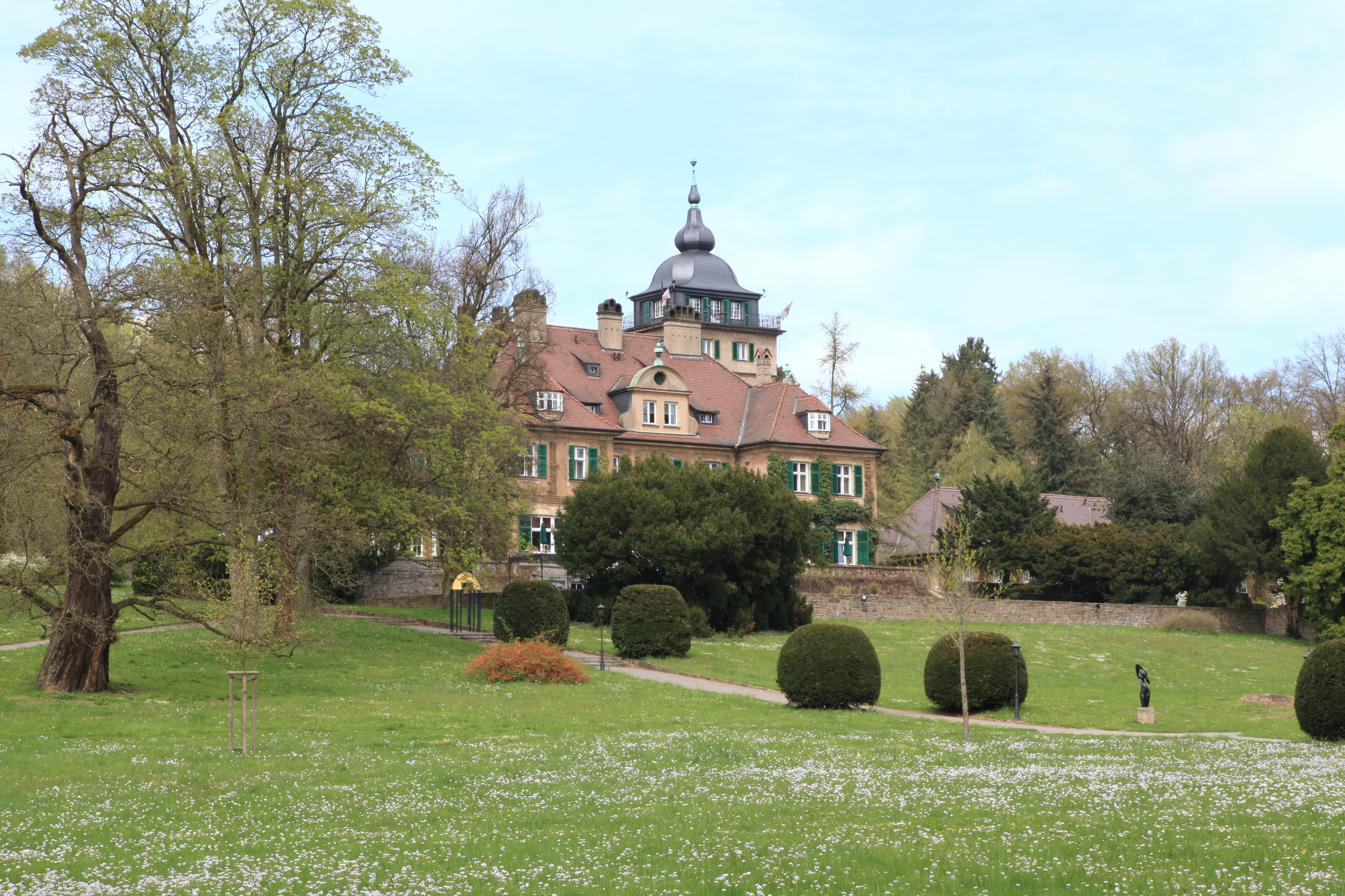 Schloss Lerbach im Schlosspark, Lerbacher Weg in Bergisch Gladbach